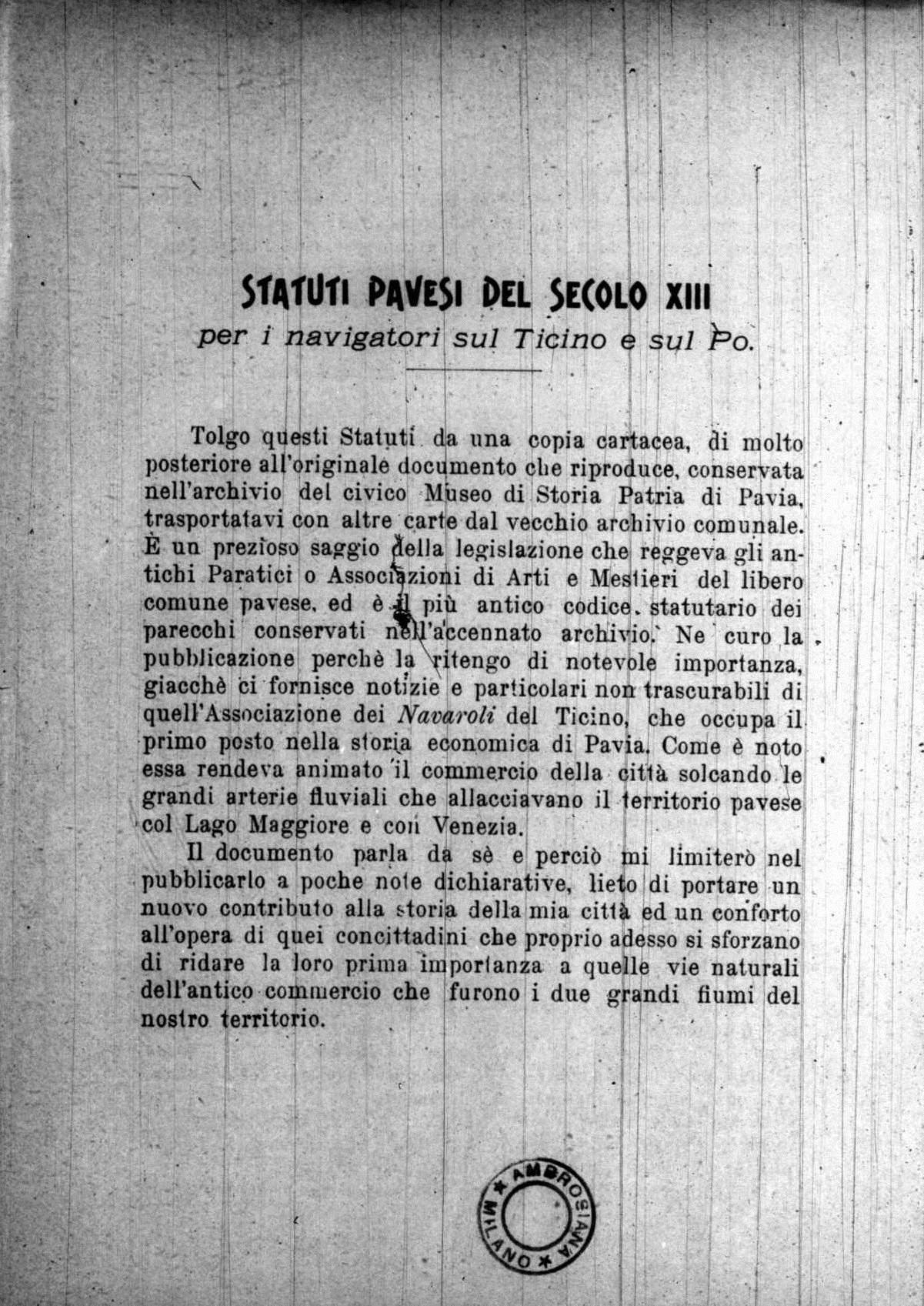 Pagina 1